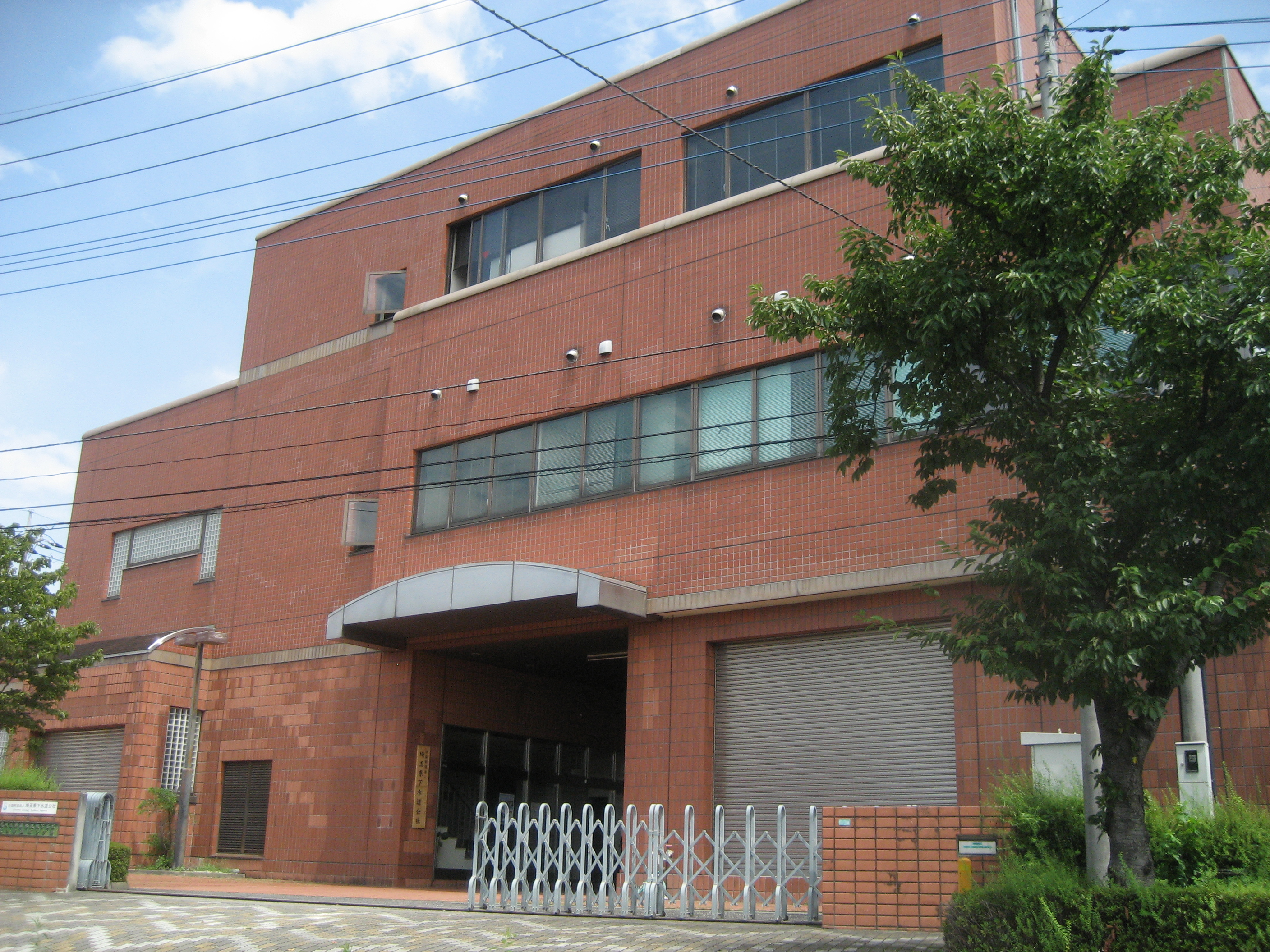 さいたま市桜区にある埼玉県下水道公社庁舎